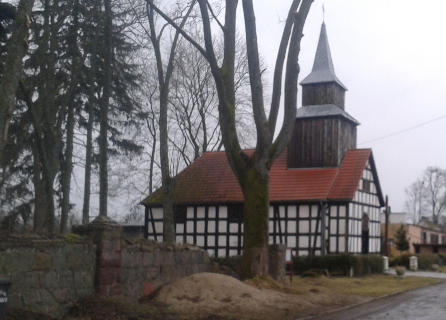 Iglice - dawny kościół ewangelicki, obecnie rzymskokatolicki filialny pw. św. Stanisława, 1696